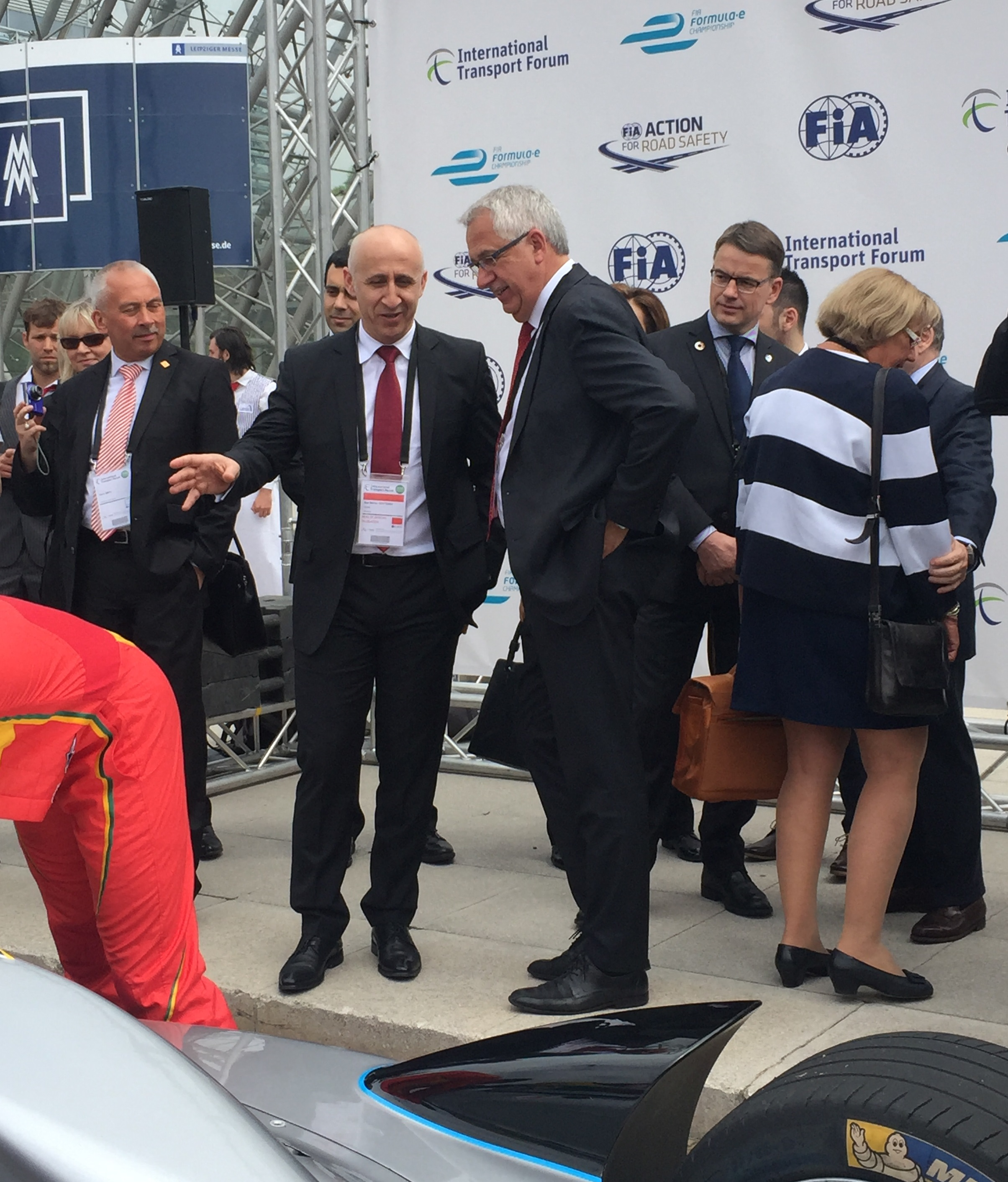 Danezul Hans-Christian Schmidt, ministrul transporturilor, despre decarbonizare, la ITF